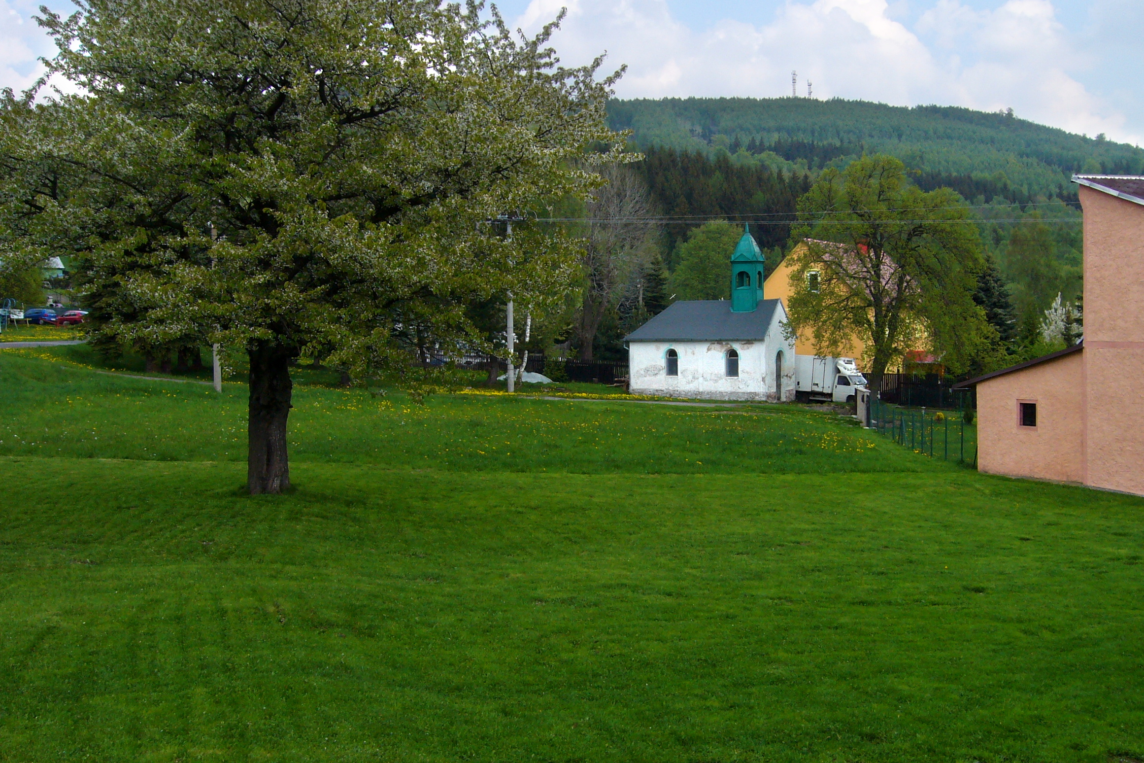 Vysoká Jedle – náves s kaplí